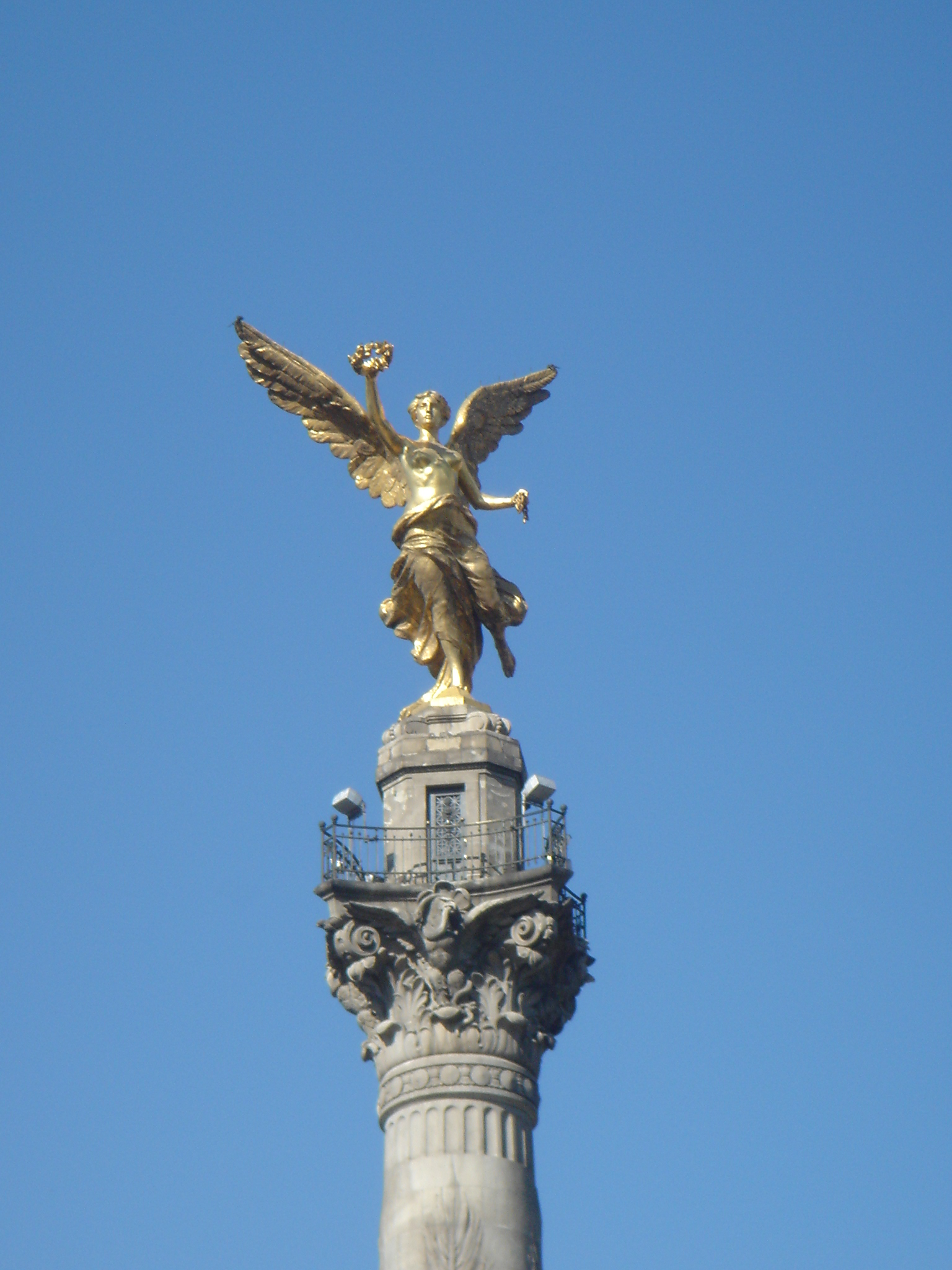 Ángel de la Independencia, Mexico City